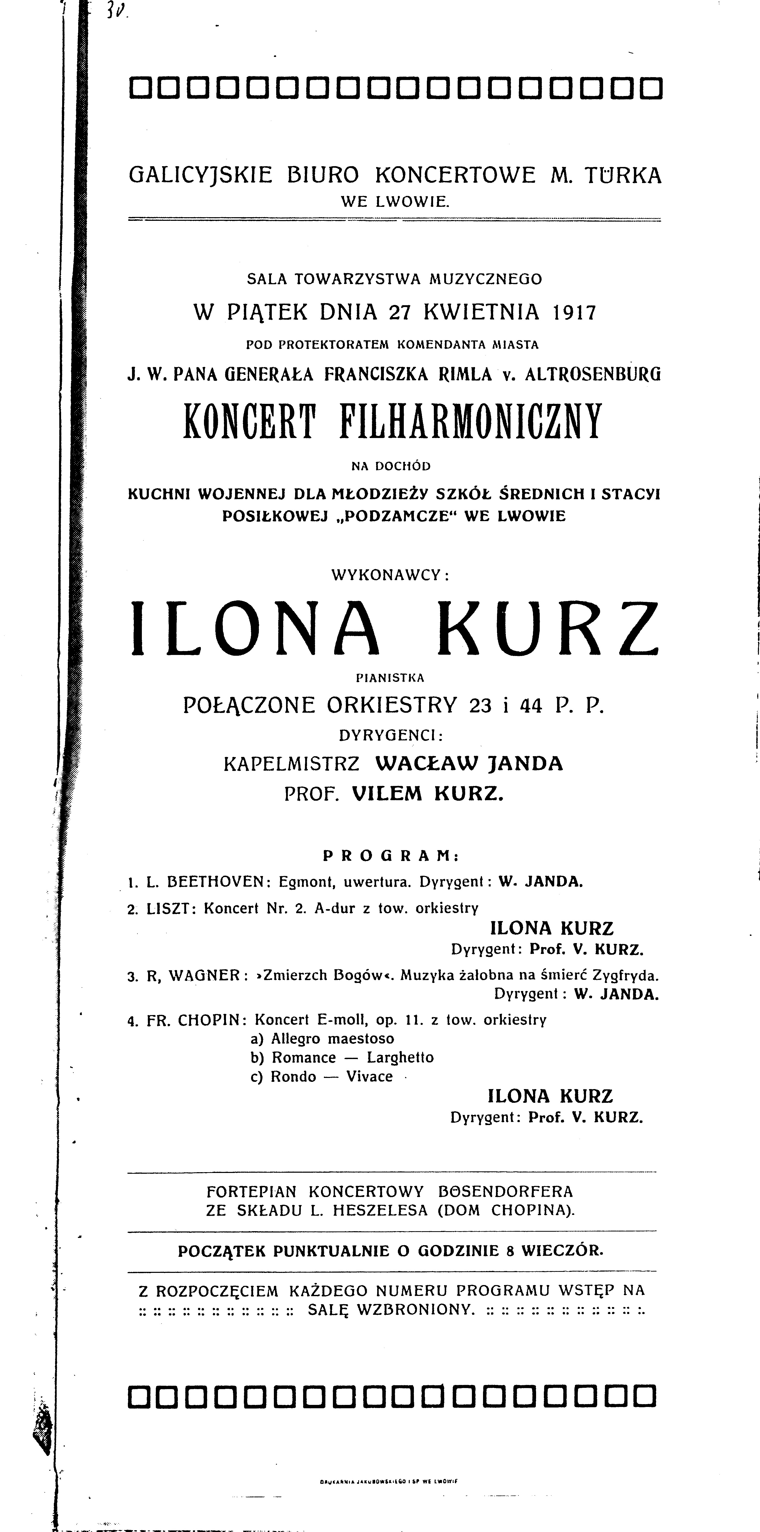 Ilona Štěpánová